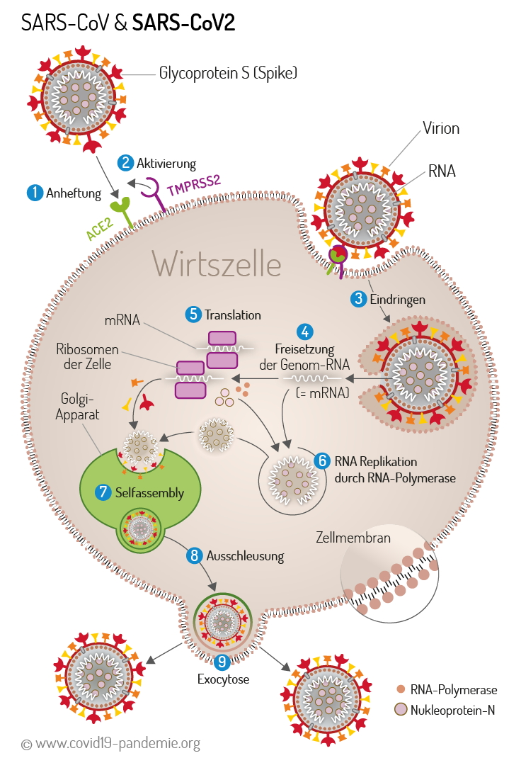 1. Zunächst heften sich die Virionen an die Oberfläche der Wirtszellen an. Dies geschieht spezifisch über bestimmte Oberflächenmerkmale (Rezeptoren) der Wirtszelle, im Fall von SARS-COV-2 über die Bindung des viralen Glykoprotein S an den ACE2-Rezeptor. Der ACE2-Rezeptor der Wirtszellen könnte deshalb ein möglicher Ansatzpunkt für eine Therapie sein. 2. Das Enzym TMPRSS2 der Wirtszelle aktiviert weitere Schritte des Infektionsvorganges, die zum Eindringen des Erregers in die Wirtszelle notwendig sind. Auch TMPRSS2 ist ein potentieller Ansatzpunkt für ein wirksames Medikament. 3. Im nächsten Schritt dringen die Erreger in die Wirtszelle ein (vereinfachte Darstellung). 4. Vor Beginn der Virusvermehrung wird die Erbsubstanz (RNA) des Virus aus dem Kapsid freigesetzt (nur ein möglicher Weg dargestellt). 5. Nun folgt der eigentliche Vermehrungsvorgang, die Replikation. Da SARS-COV-2 über RNA positiver Polarität verfügt, kann die RNA direkt als „Bauanleitung“ (mRNA) für virusspezifische Proteine genutzt werden (Translation). Für die Wirtszelle ist die Virus-RNA praktisch nicht von eigener mRNA zu unterscheiden und der Syntheseapparat (Ribosomen) der Wirtszelle produziert virusspezifische Proteine (S, M, E, N, RNA-Polymerase) 6. Die Erbsubstanz (RNA) des Virus wird in der Wirtszelle durch Kopieren vervielfältigt (RNA-Replikation). Dazu sind die Enzyme der Wirtszelle selbst nicht in der Lage, diese Aufgabe wird von der viralen RNA-Polymerase übernommen, die viele Kopien der gesamten Virus-RNA herstellt. 7. Sind virale RNA-Kopien und Virusproteine in ausreichender Menge von der Wirtszelle hergestellt, werden sie ins endoplasmatisches Retikulum (ER) aufgenommen und Lagern sich zu neuen Viren zusammen (selfassembly). 8. Die fertigen Viruspartikel werden als Golgi-Vesikel aus dem ER abgeschnürt (Knospung). 9. Durch Exocytose gelangen die Viren aus der Wirtszelle.